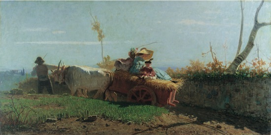 Ritorno dai campi